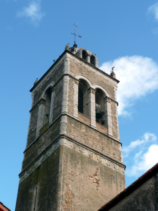 Campanar de Santa Maria de Vilanant (Alt Empordà)